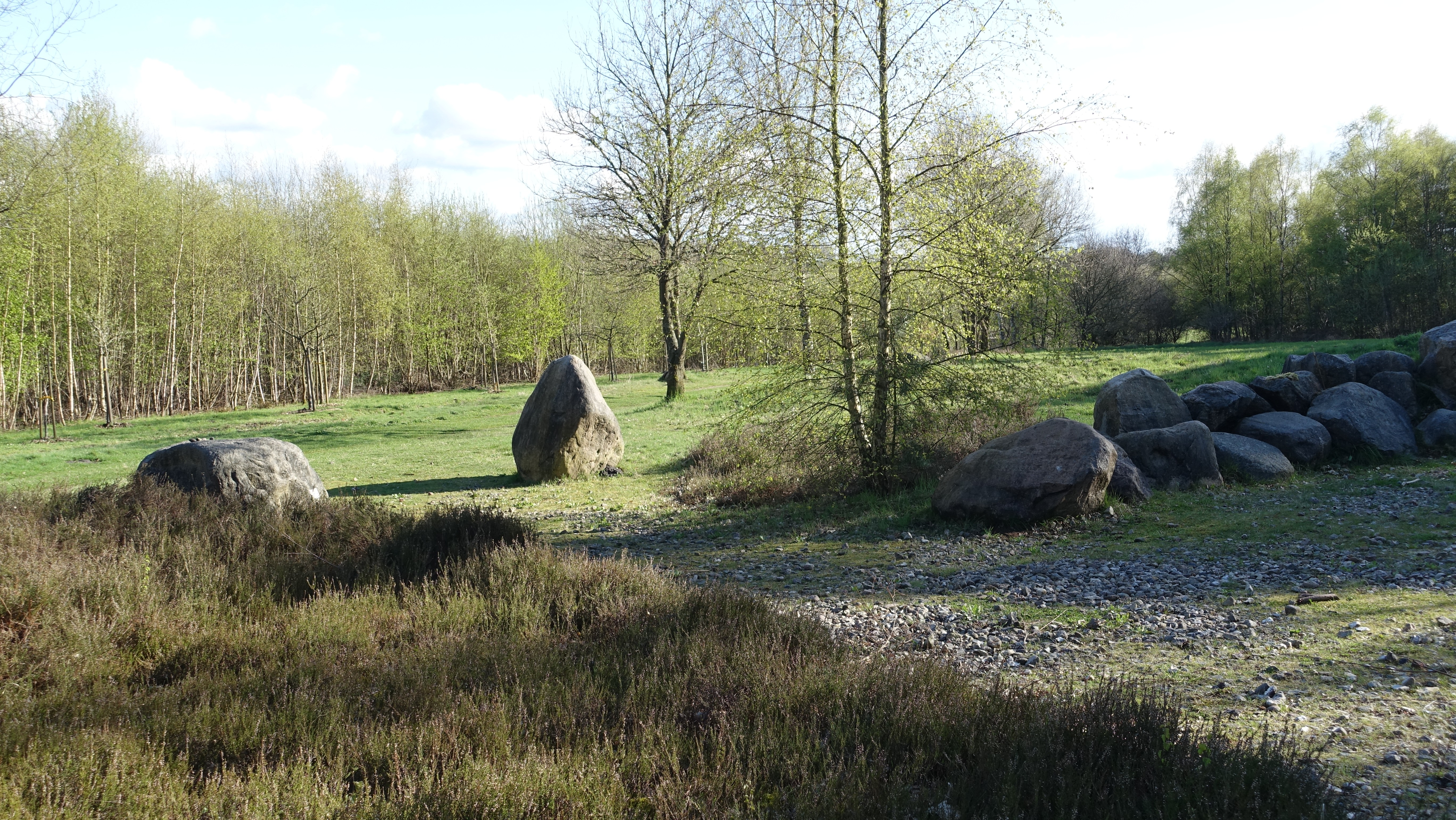 Harsefeld - Garten der Steine, Findling